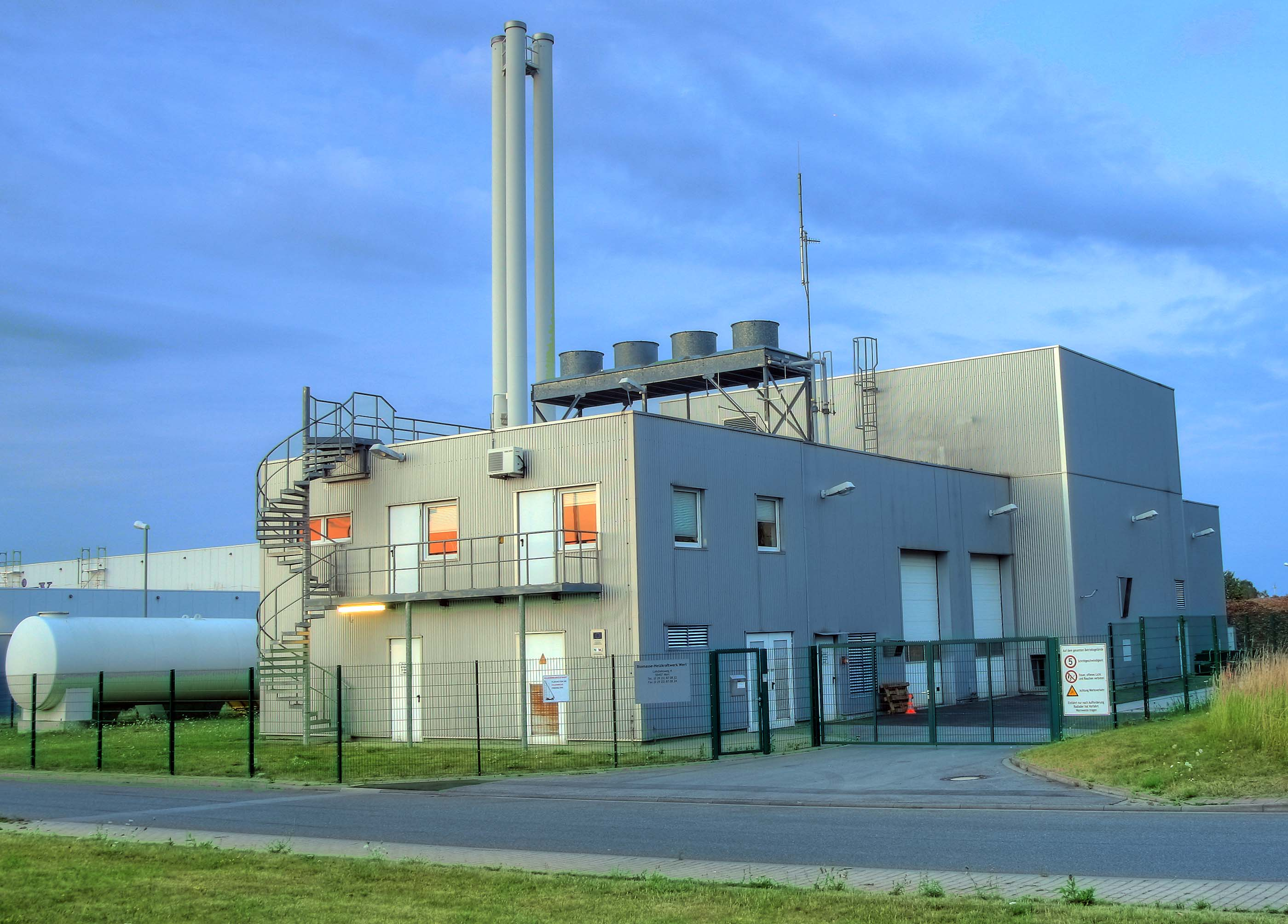 Kraftwerk, Biomasse, Betriebsgelände, Kesselhaus